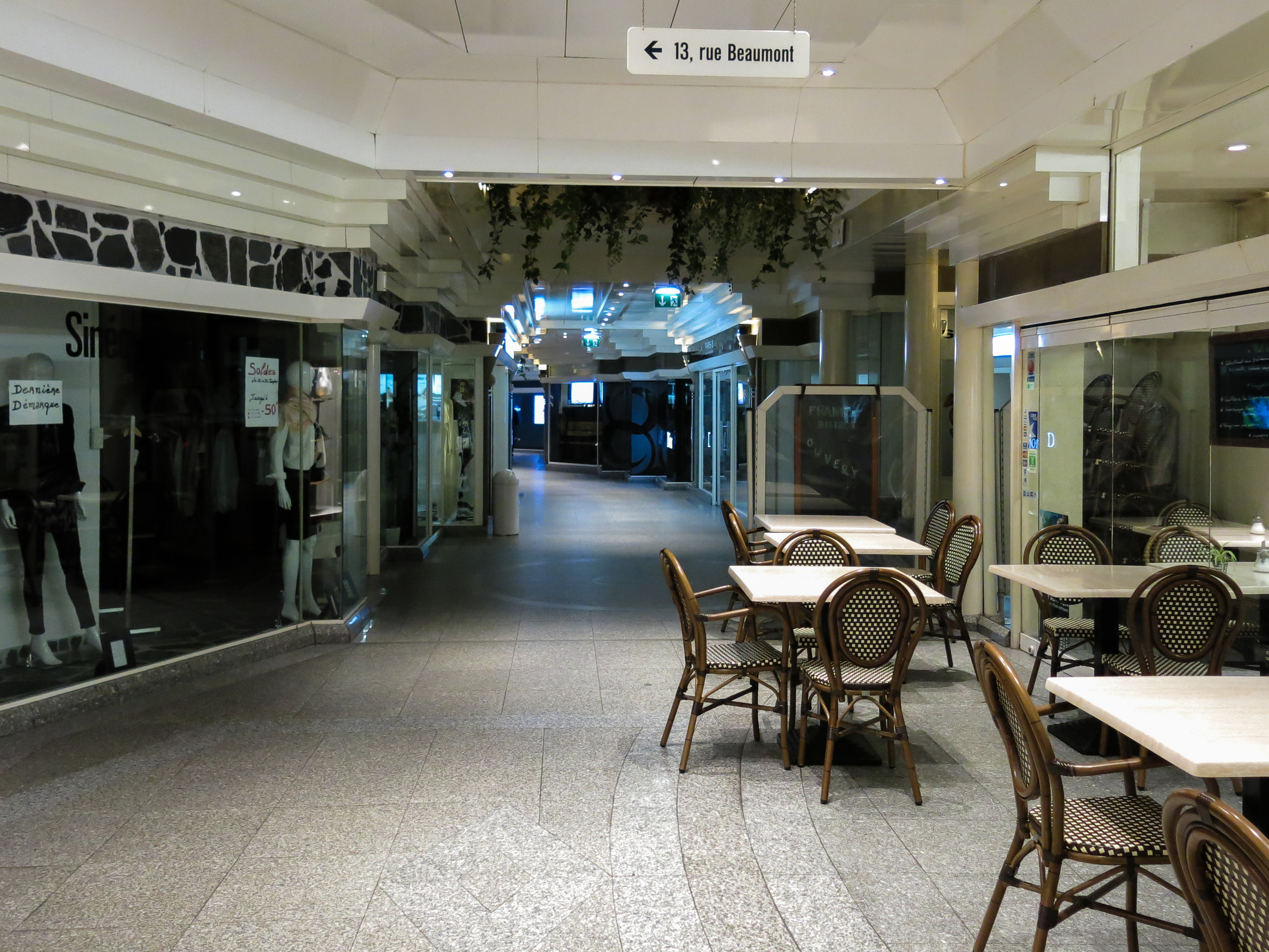 D'Galerie Beaumont an der Uewerstad zu enger méi spéider Stonn.